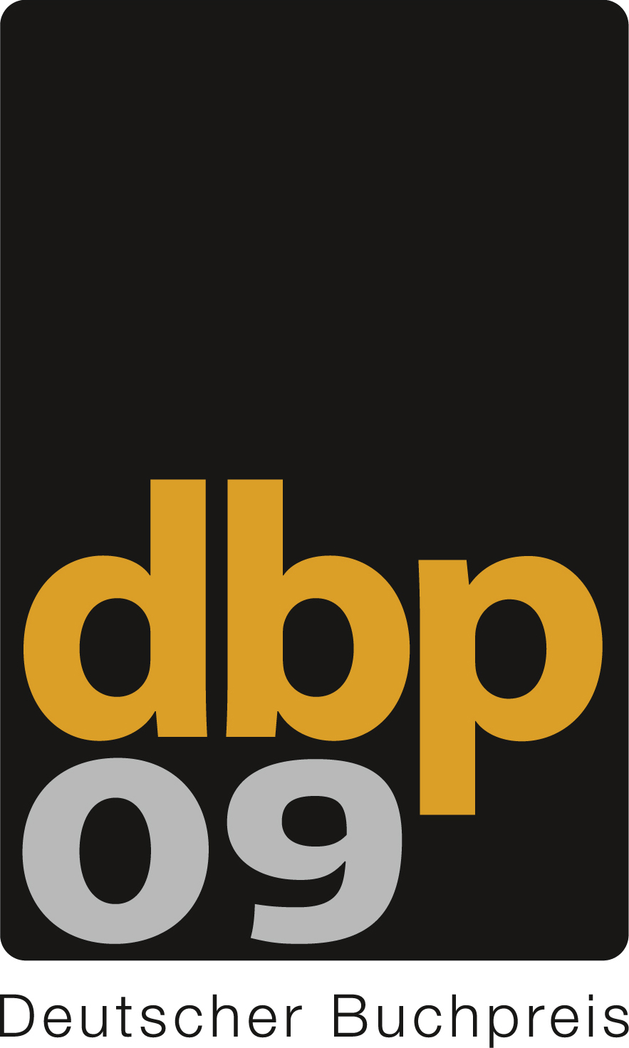 Logo Deutscher Buchpreis 2009